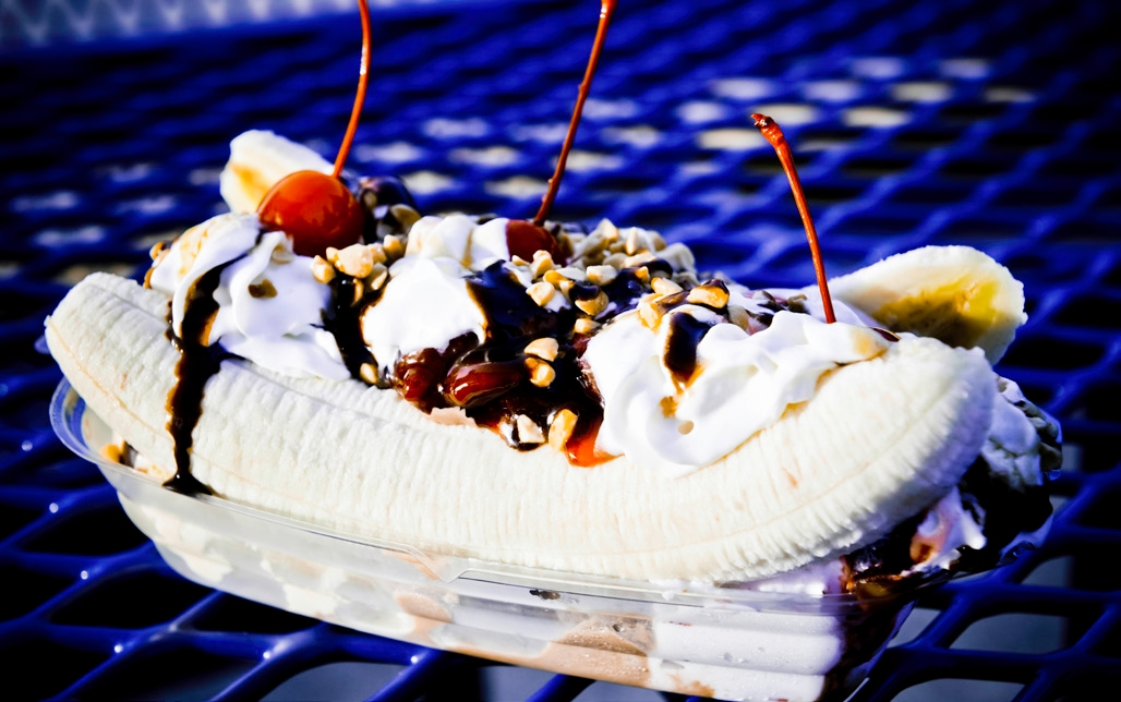 Banana split at Guantanamo.